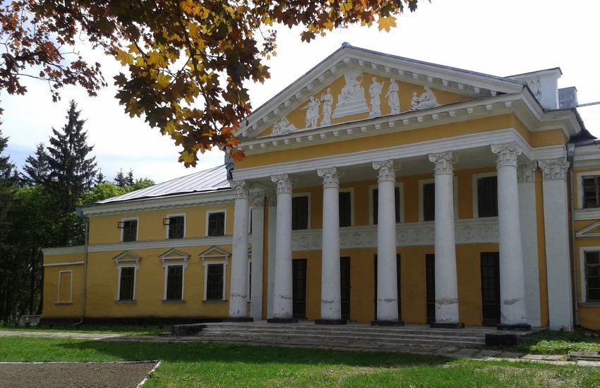 Верхівнянський, Ружинськнй р-н, с. Верхівня